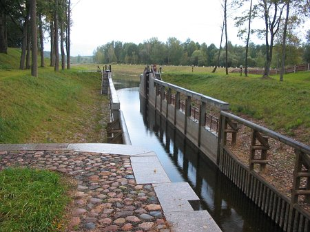 Немново, шлюз "Немново" Августовского канала